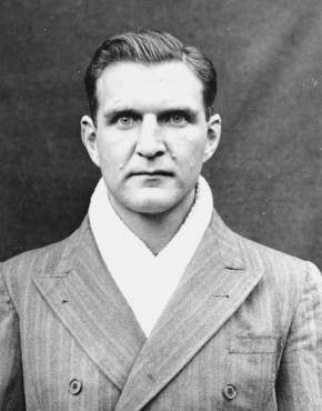 Portrait of Fritz Fischer as a defendant in the Medical Case Trial at Nuremberg [Photograph #06234] Portrait von Fritz Fischer als Angeklagter im Nürnberger Ärzte Prozess. [Fotografie#06234]